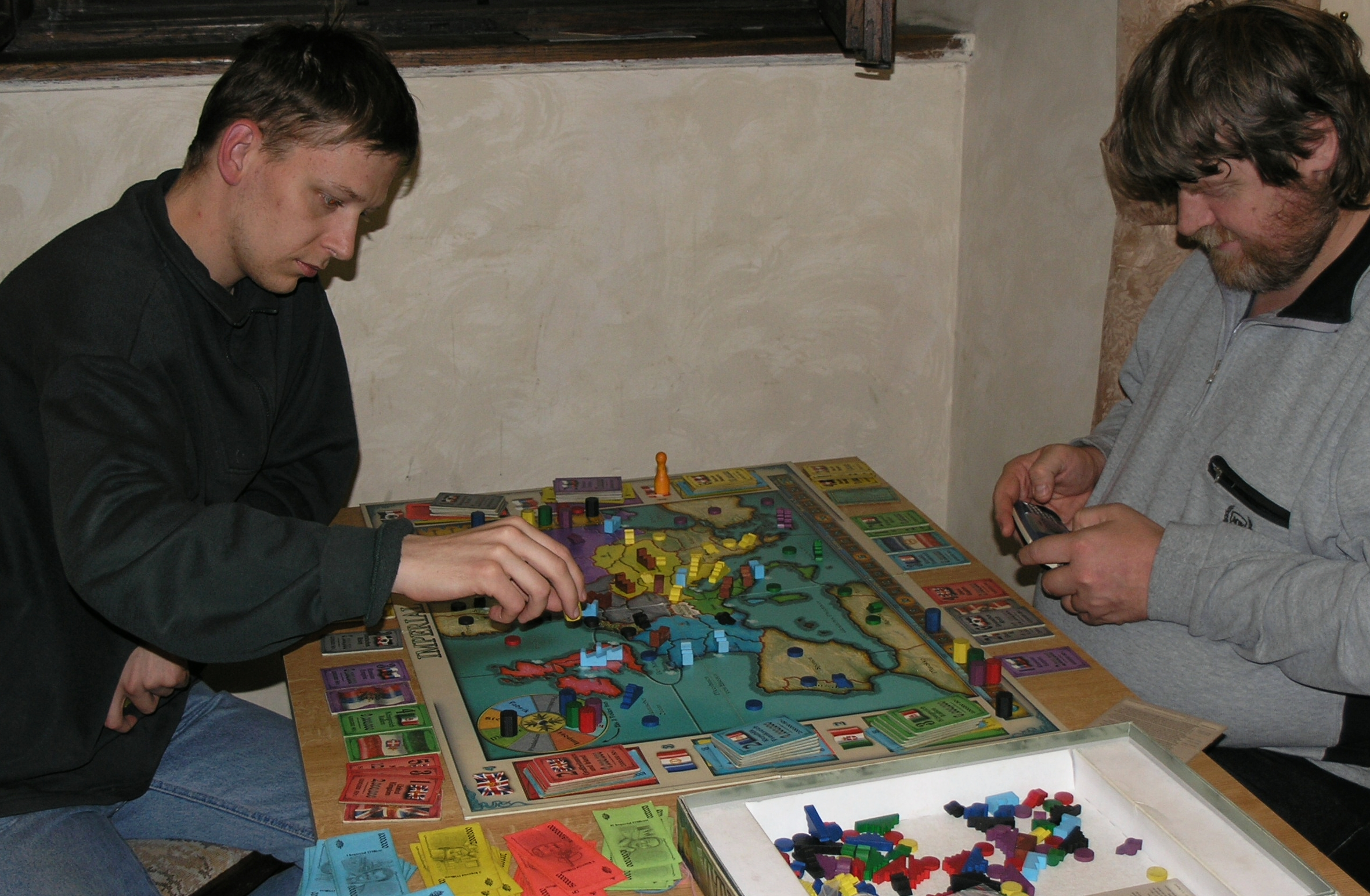 Deskohraní 2008